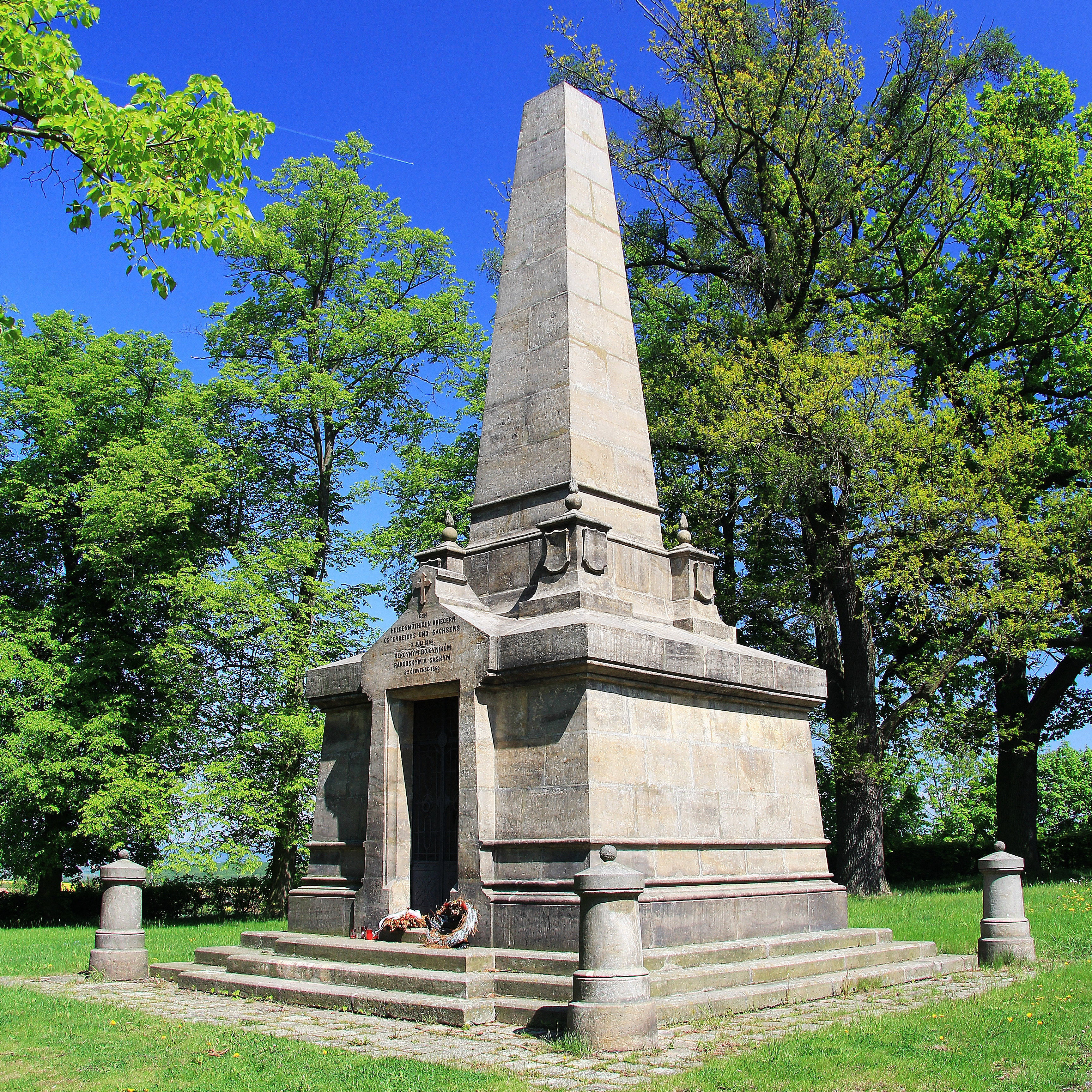 Mauzoleum - památník prusko-rakouské války r. 1866 (Lípa)